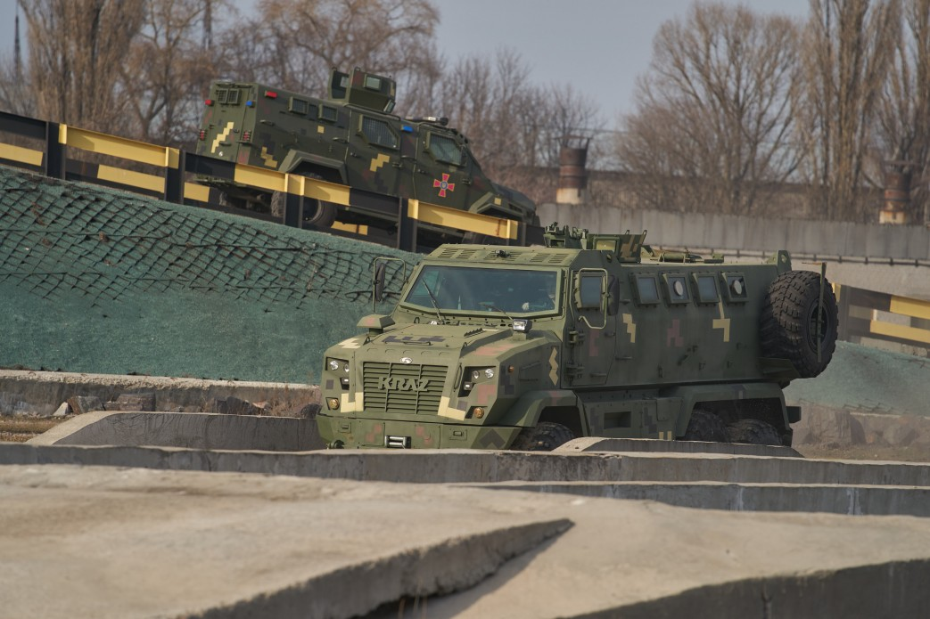 Краз Шрек на території випробувального полігону у Кременчузі